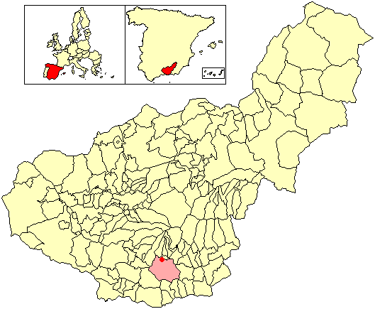 Situación de la localidad de Bayacas (en el municipio de Órgiva) respecto a la provincia de Granada, en España.